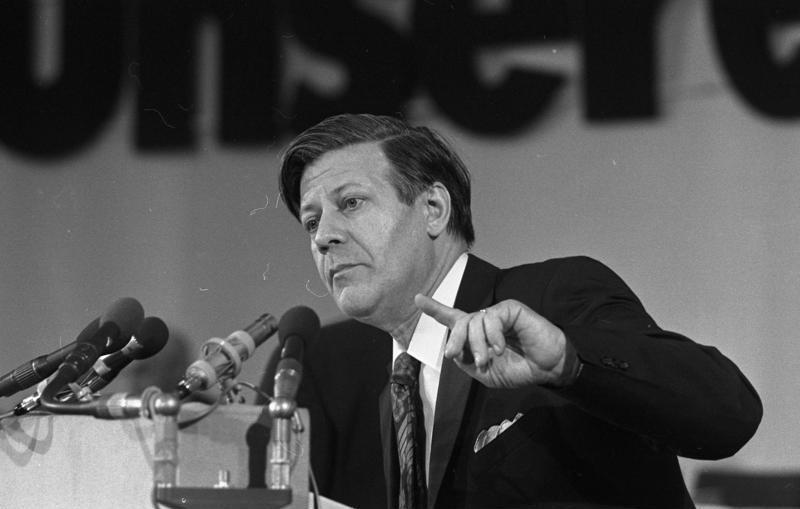 Bundesparteitag der SPD in Hannover (Helmut Schmidt) 10.-14.4.1973